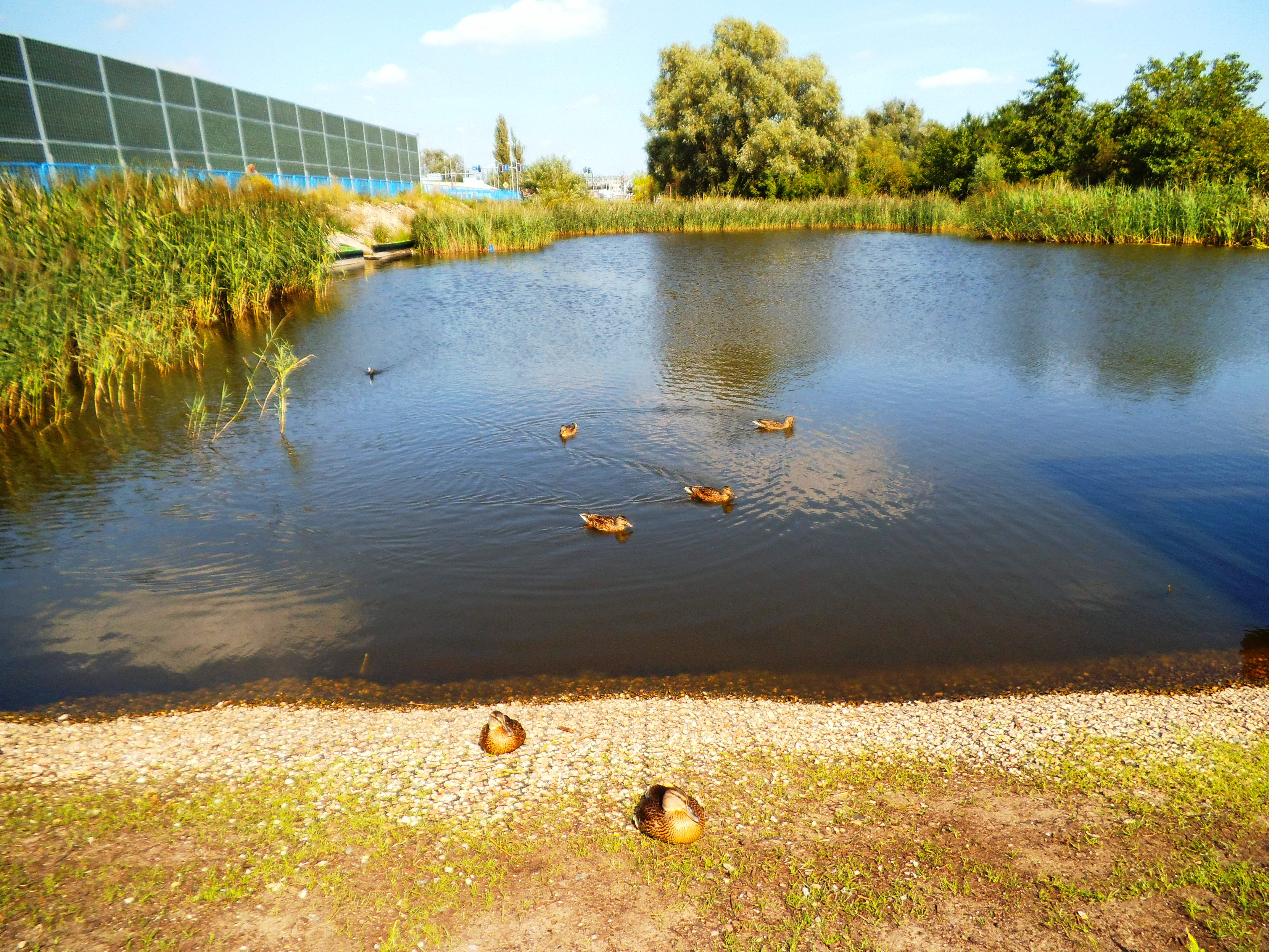 Stawy Mokrzańskie w Toruniu